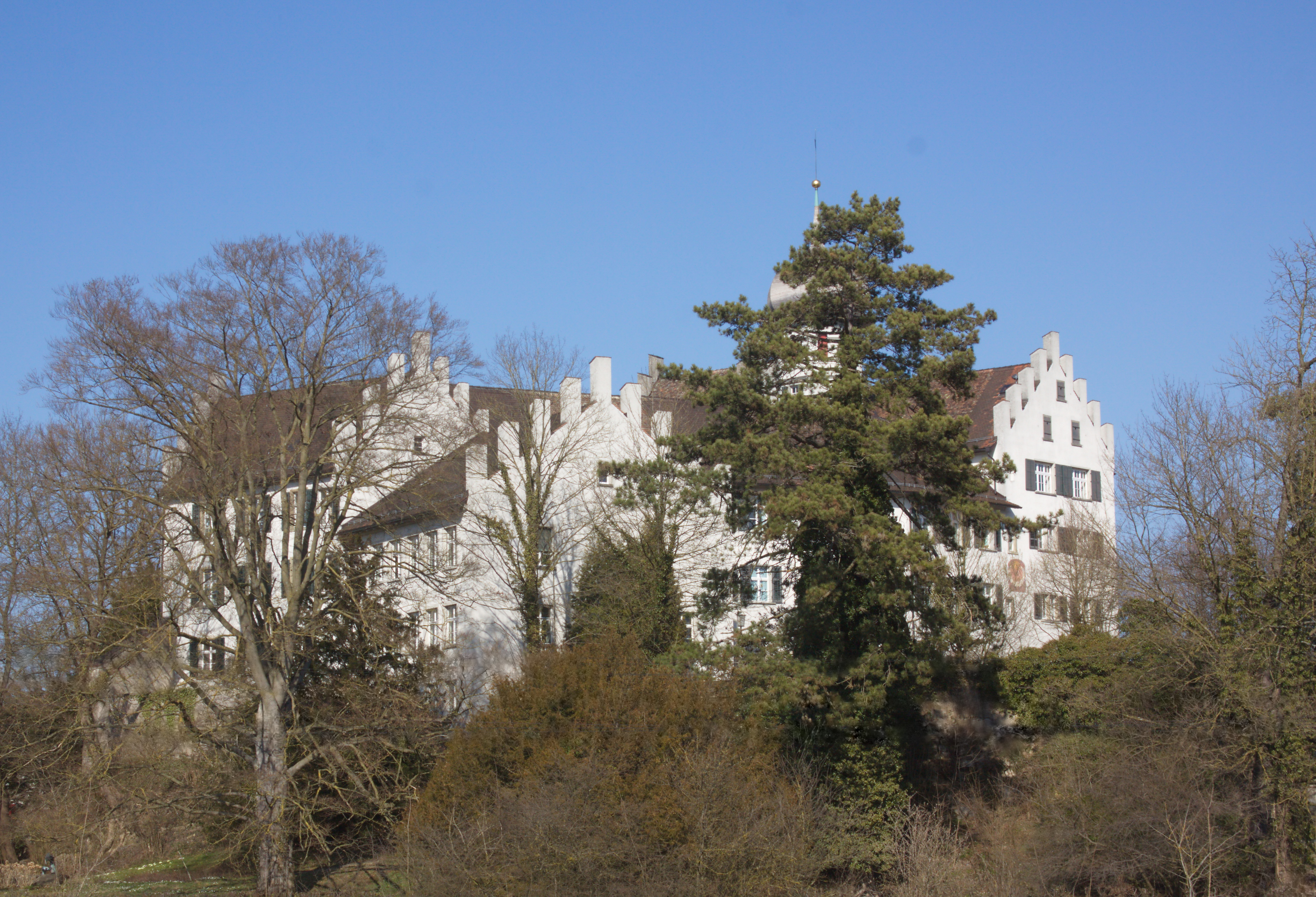 Schloss Bürglen TG